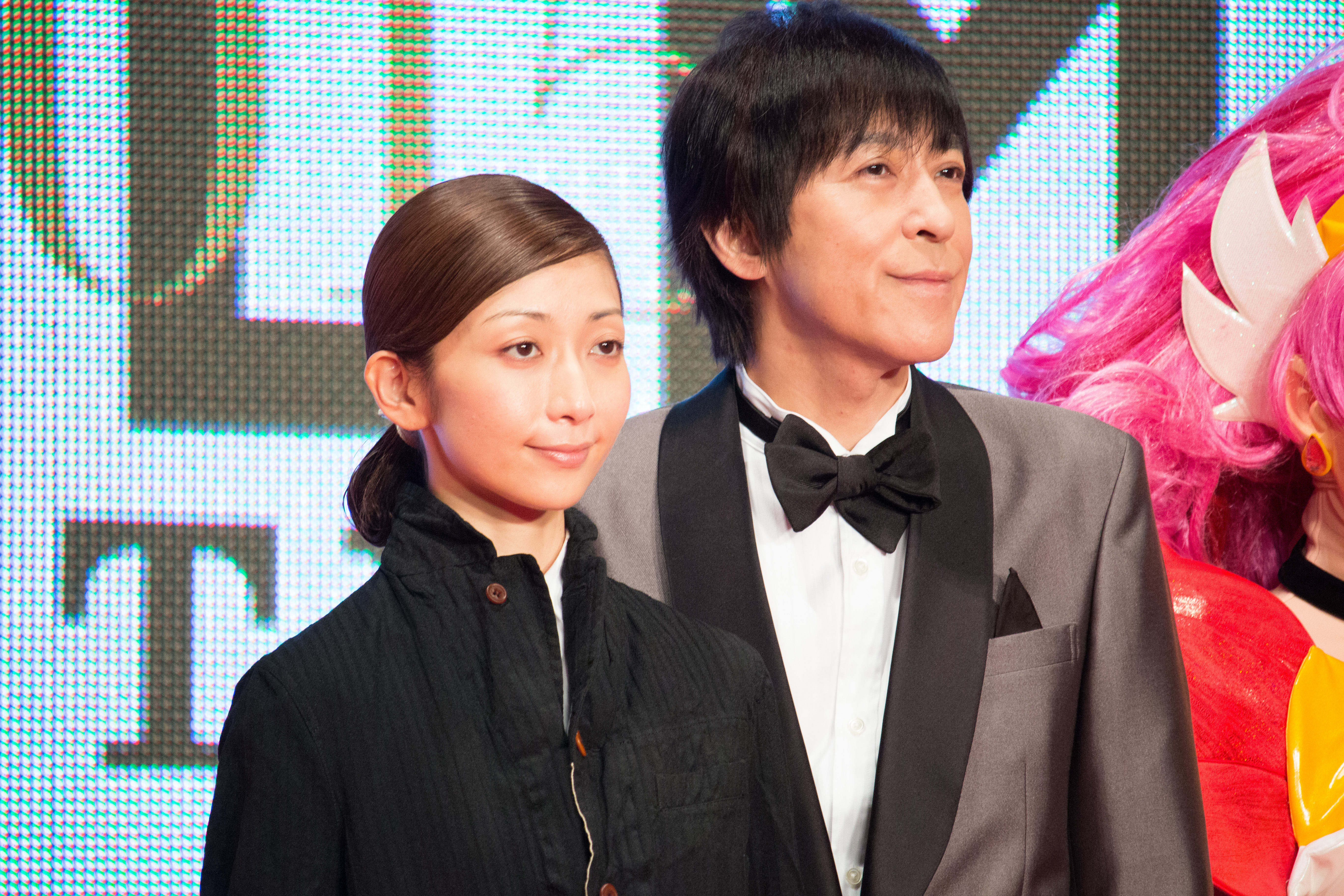 第28回 東京国際映画祭 オープニングセレモニー 持田香織 伊藤一朗 (Every Little Thing) (Go!プリンセスプリキュア)